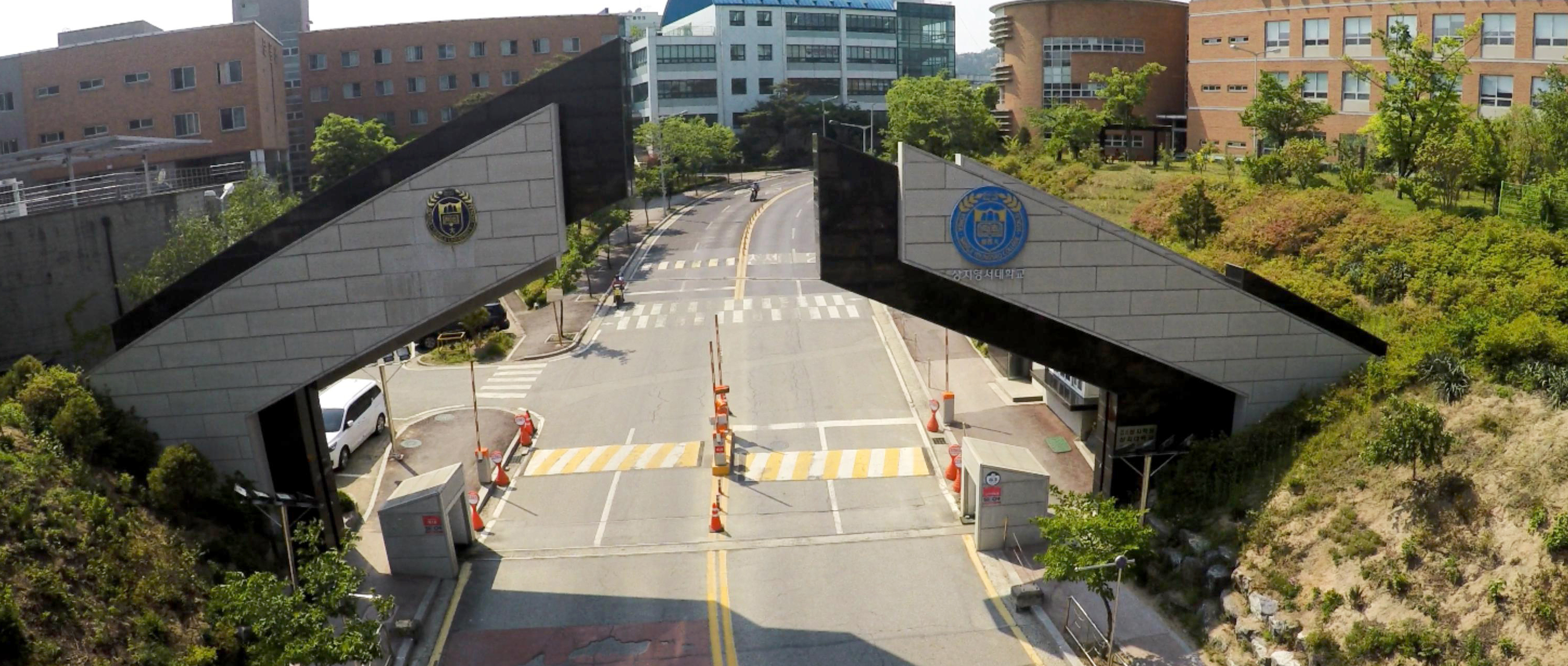 상지대학교 정문